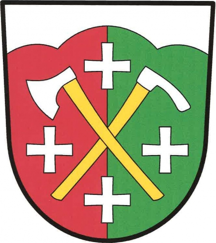 znak, Velká Lhota, okres Vsetín